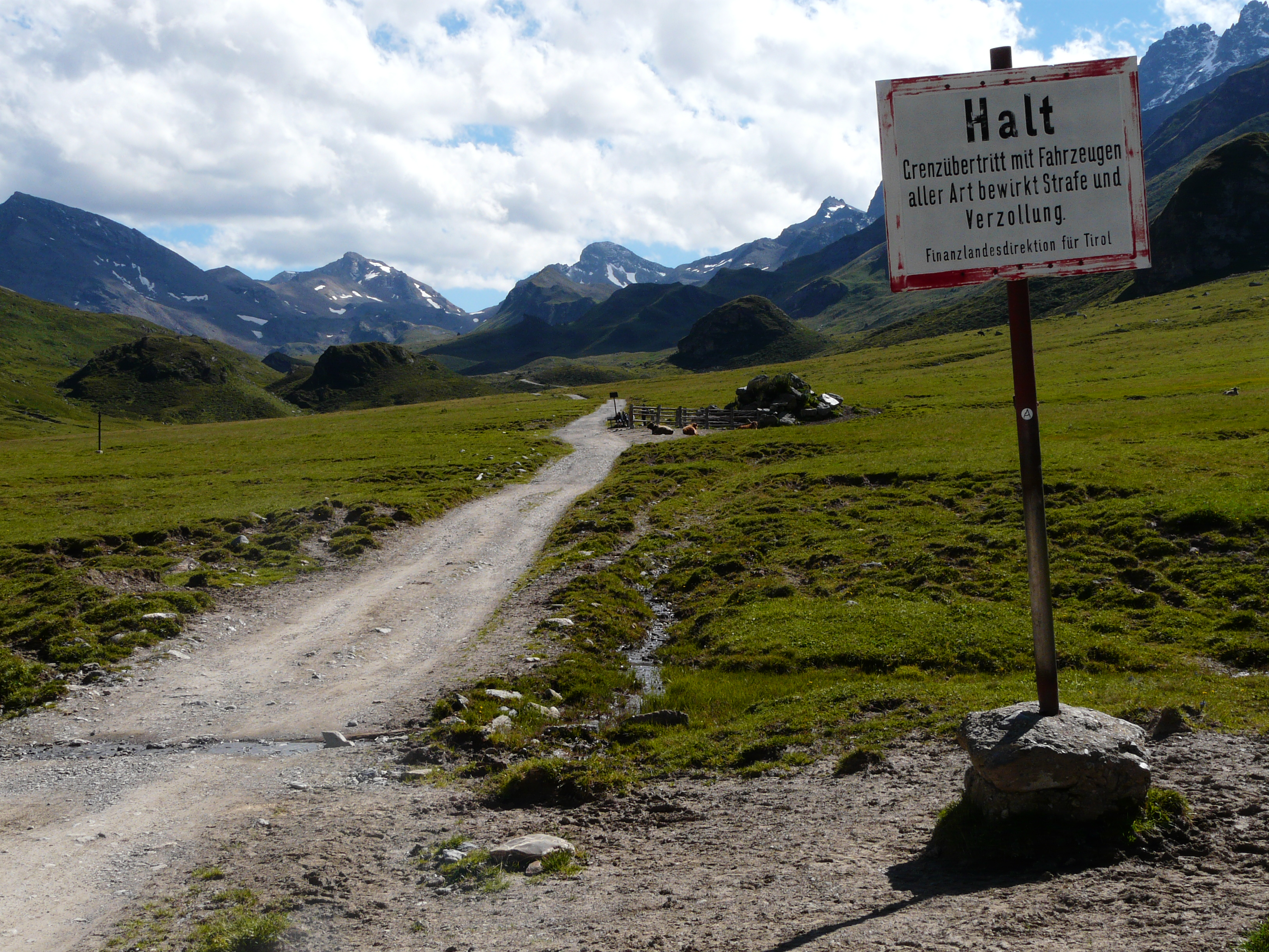 Grenze A/CH im Fimbatal (A)/ Val Fenga (CH) (Silvretta) Piz Tasna (links der Bildmitte) Breite Krone bzw. Curuna Lada (Bildmitte)